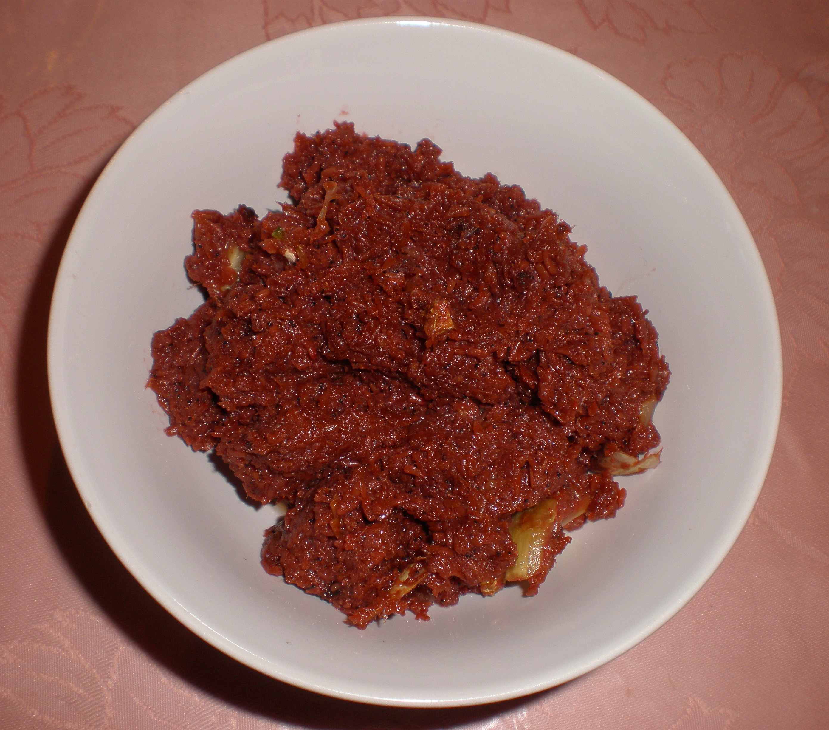 Bagoong